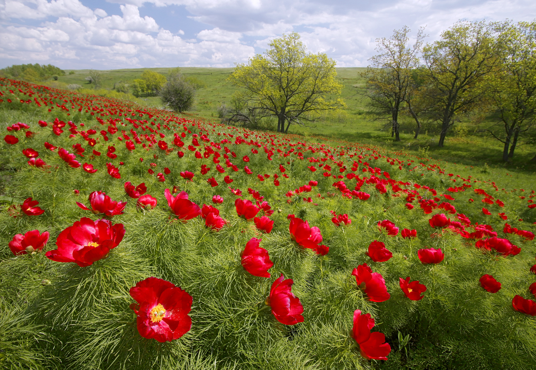 Территория, представляющая особую ценность для сохранения объектов животного и растительного мира, занесенных в Красную книгу Волгоградской области "Пион тонколистный": Расположена на территории Руднянского муниципального района Волгоградской области, в 8 км ЮЗ села Терсинка, Руднянский район, Волгоградская область This image is related to the protected area of Russia number 3410357